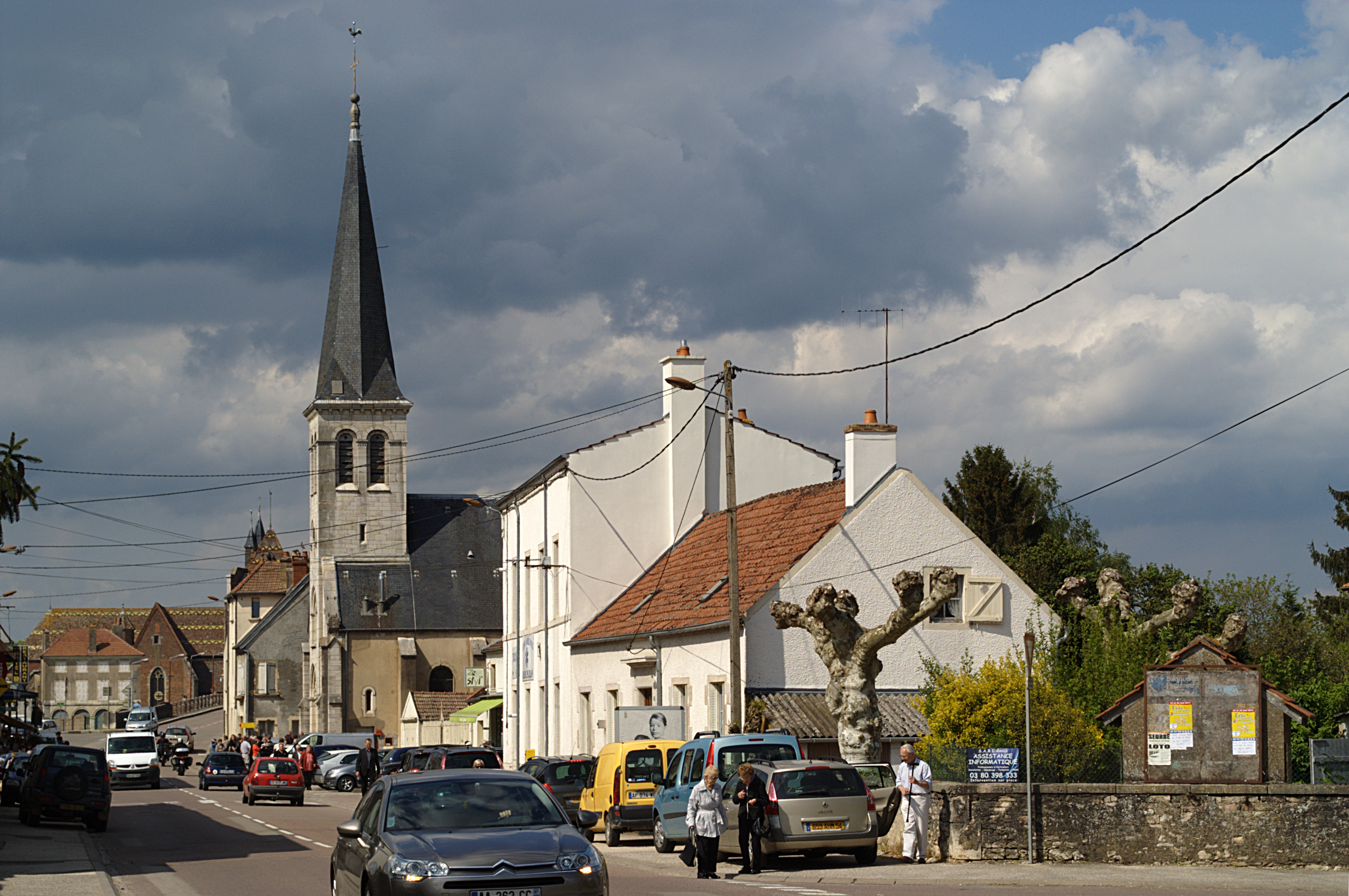 Église paroissiale, Rue Nationale, Losne (Côte d'Or, Bourgogne, France)